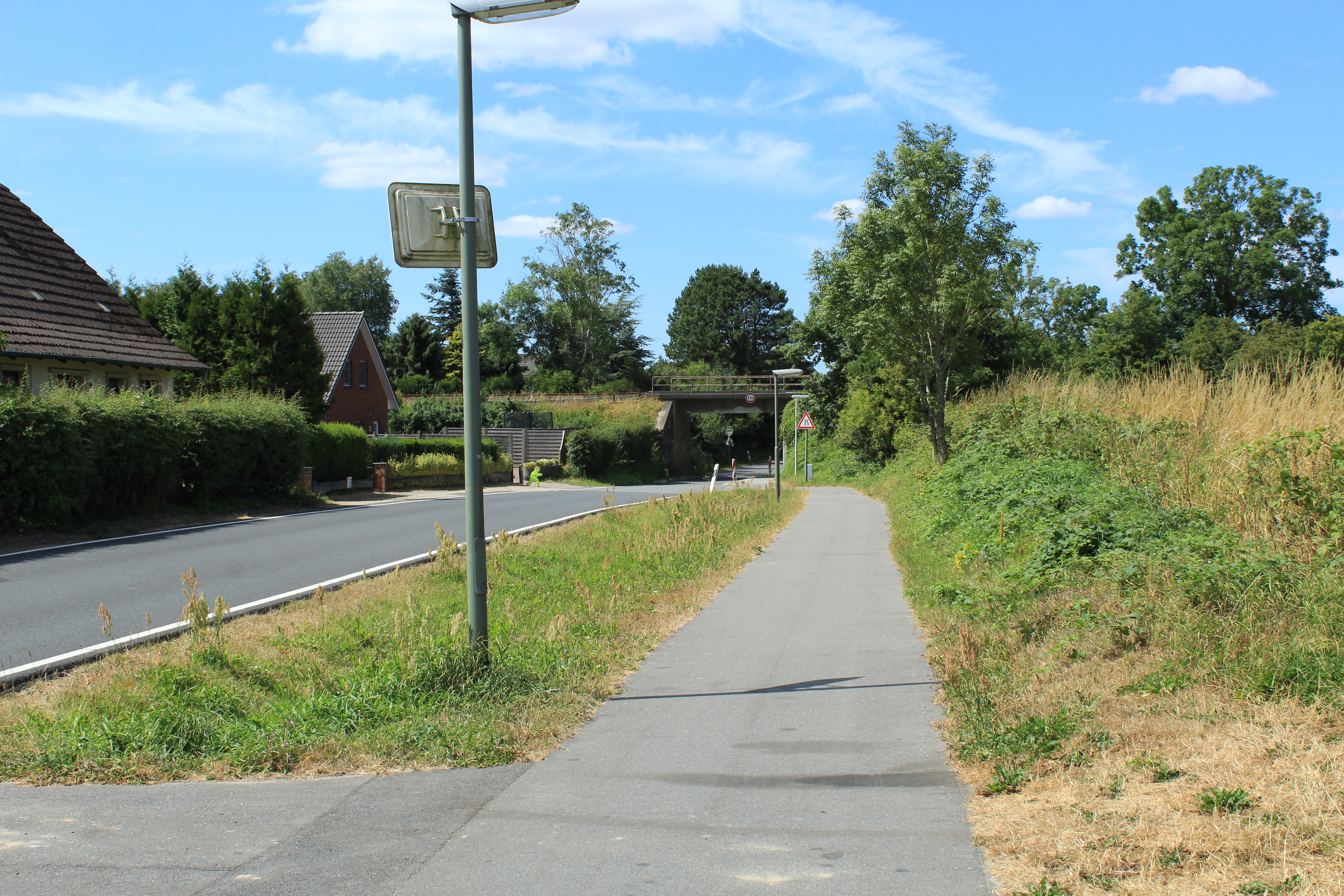 Ringstraße in Richtung Flensburg und Eisenbahnbrücke Kiel-Flensburg im Hintergrund